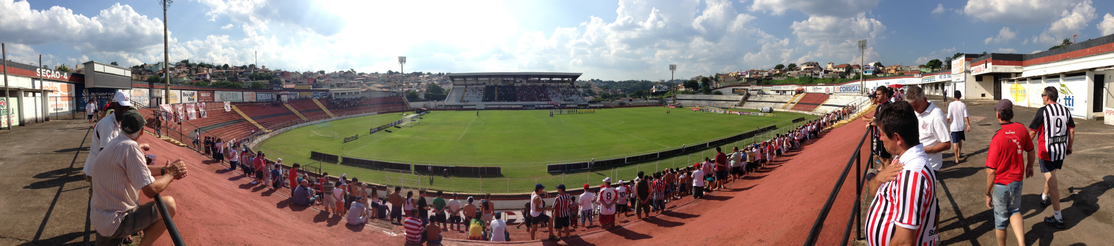 Estádio Dr. Jayme Pinheiro de Ulhôa Cintra - Jundiaí/SP (18/01/2014) Paulista 0 x 0 Audax - Campeonato Paulista Série A1